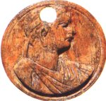 Ptolemy XIV.